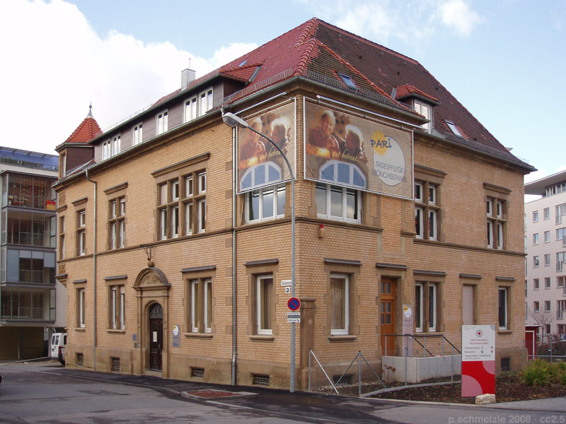 Gebäude Cäcilienstraße 3 in Heilbronn